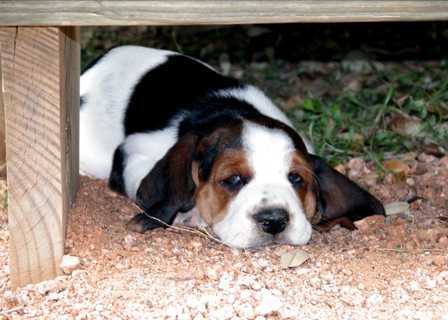 Basset Hound Puppy